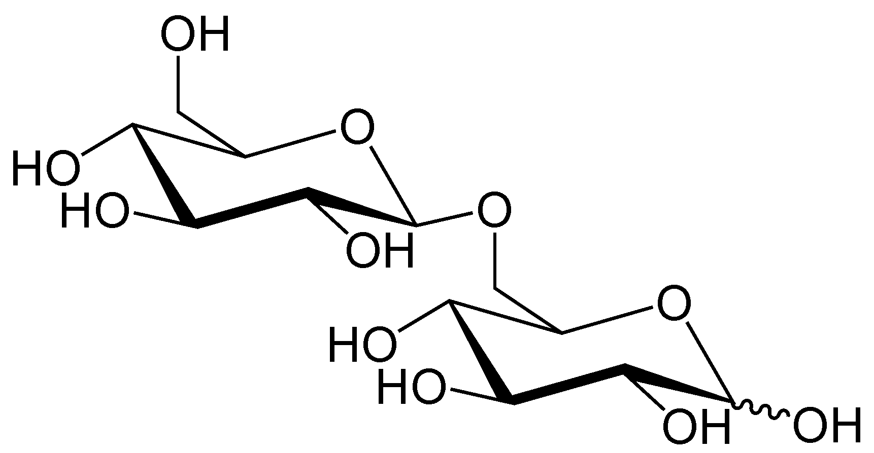 Gentiobiose